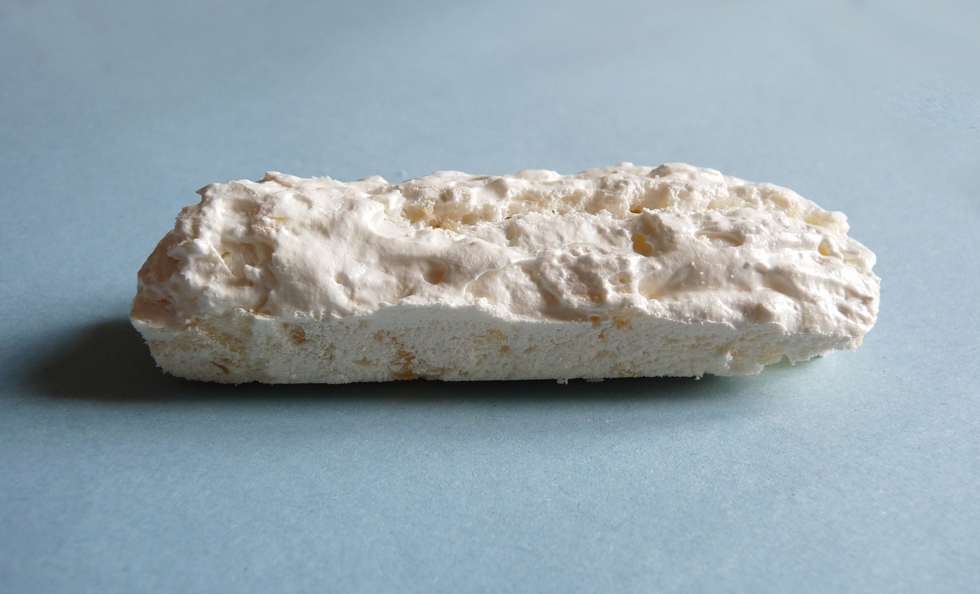 Caisse de Wassy : spécialité meringuée aux amandes de Wassy (Haute-Marne)